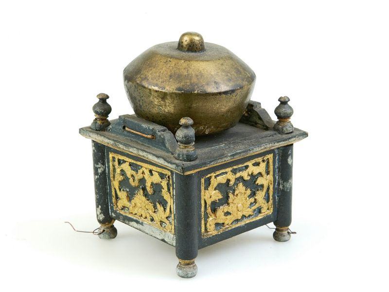 Model. Behoort tot een model van een gamelan-slèndro, bestaande uit 39 stukken.. Model van een gong van koper van een gamelan-orkest Unknown language: kenong